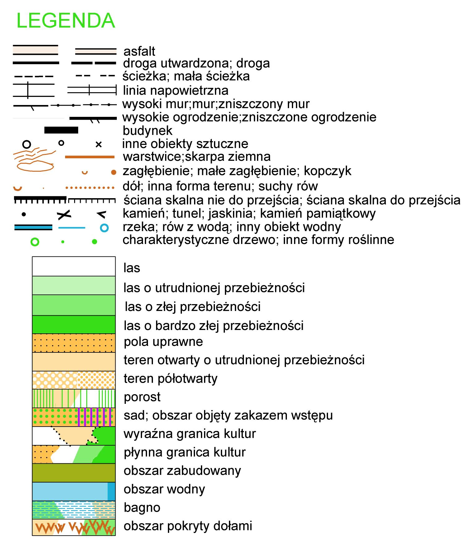 Legenda mapy do biegu na orientację.